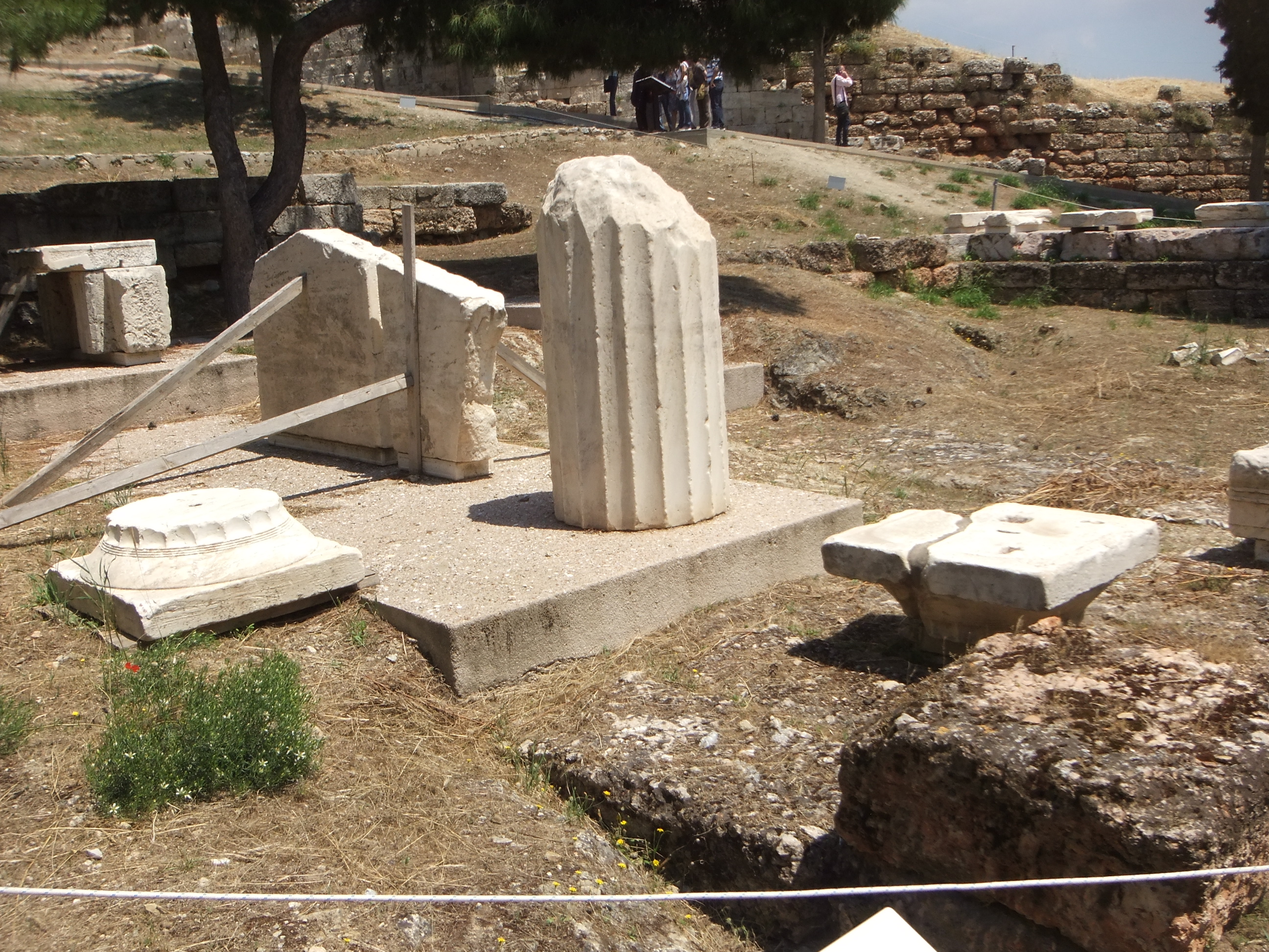 Monument chorégique de Nicias, situé à l'ouest du théâtre de Dionysos, Athènes.